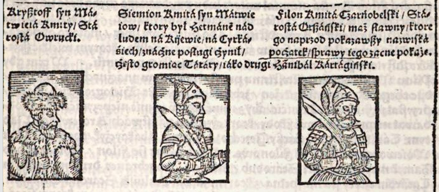 Кмиты Чернобыльские: Криштоф, Семён и Филон в книге Bartoszа Paprockiego "Gniazdo cnoty: zkąd herby rycerstwa sławnego Krolestwa Polskiego, Wielkiego Księstwa Litewskiego, Ruskiego, Pruskiego, Mazowieckiego, Zmudzkiego y inszych Państw do tego Krolestwa nalezacych Książąt y Panow poczatek swoy maią". Kraków: 1578, s. 1183